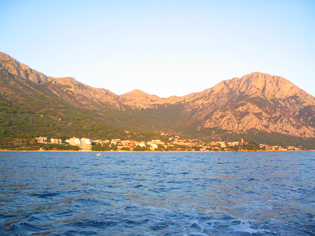 Gradac - pohľad z mora